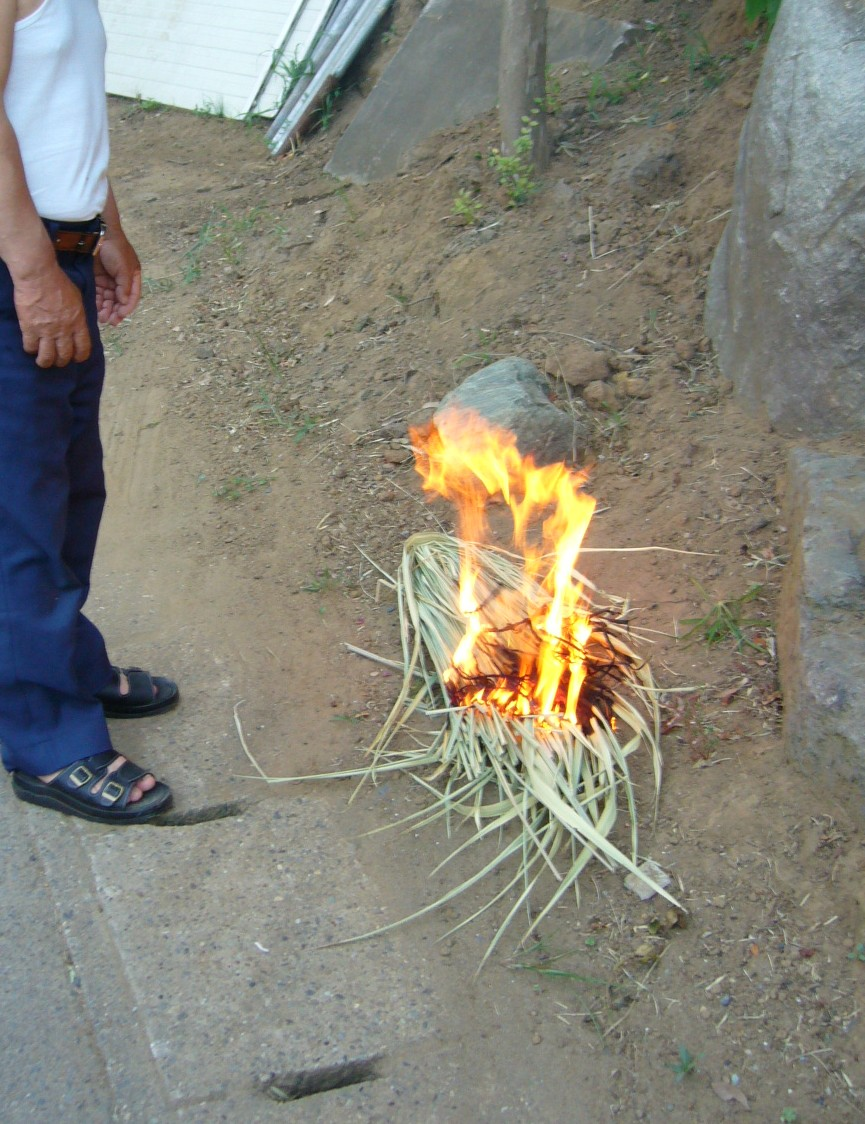 mukae-bi,obon,katori-city,japan